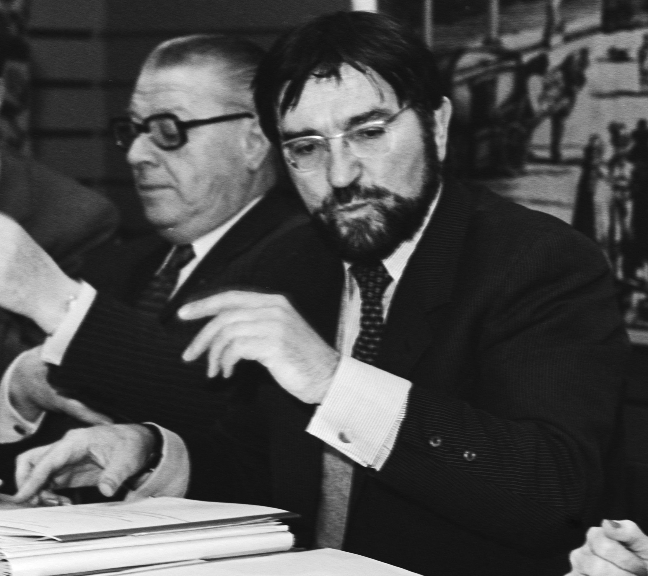 Collectie / Archief : Fotocollectie Anefo Reportage / Serie : [ onbekend ] Beschrijving : Persconferentie van het Ministerie van Verkeer en Waterstaat i.v.m. het Benelux-zeehavenoverleg in Den Haag; v.l.n.r. Olivier (Openbare Werken, België), De Croo (Verkeerswezen en PTT, België) (niet in beeld: Smit-Kroes (Verkeer en Waterstaat)) Datum : 30 november 1982 Locatie : Den Haag, Zuid-Holland Trefwoorden : ministers, persconferenties Persoonsnaam : De Croo, Herman, Olivier, Louis, Smit-Kroes, Neelie Fotograaf : Antonisse, Marcel / Anefo Auteursrechthebbende : Nationaal Archief Materiaalsoort : Negatief (zwart/wit) Nummer archiefinventaris : bekijk toegang 2.24.01.05 Bestanddeelnummer : 932-4225